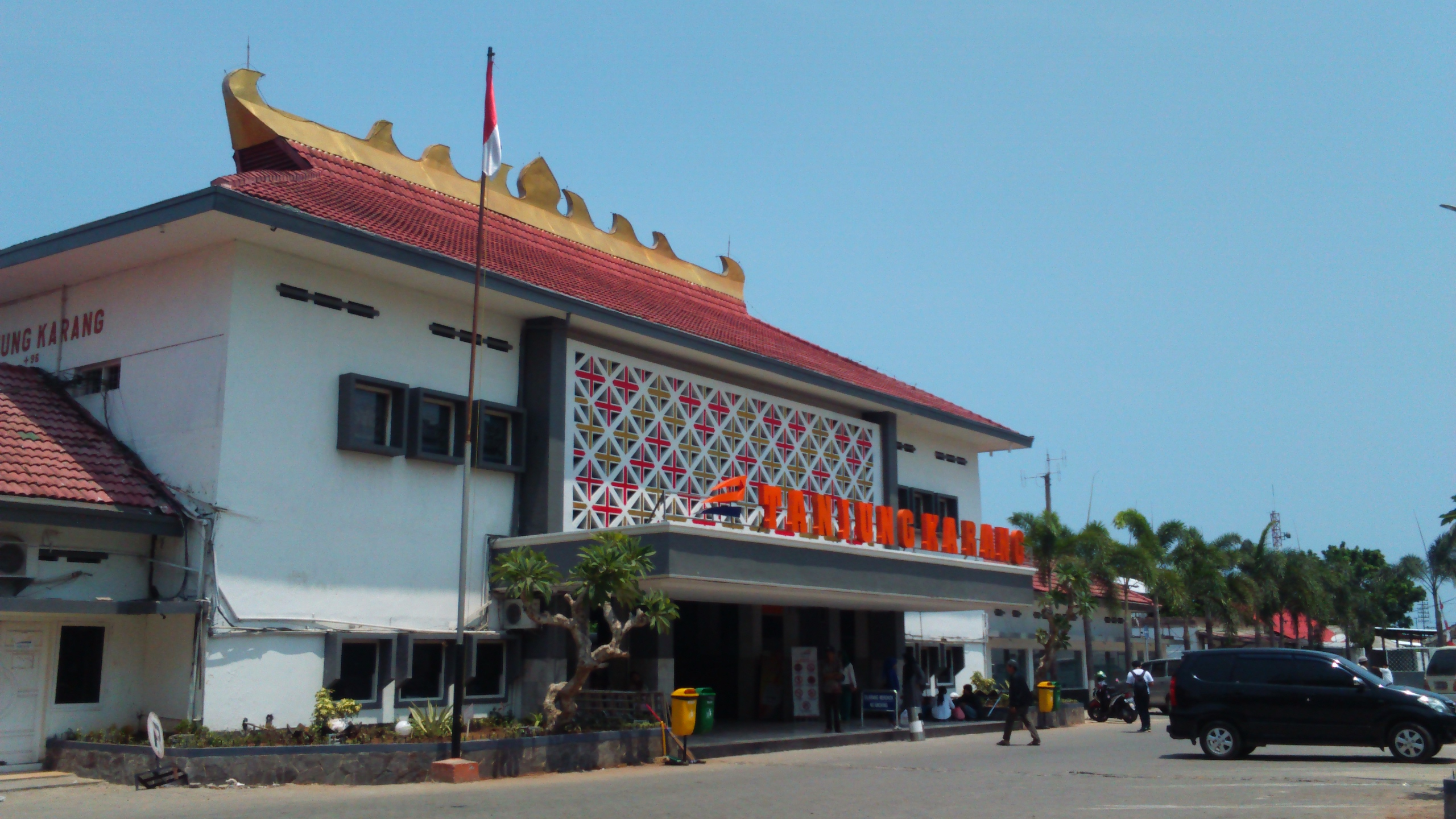 Stasiun Tanjungkarang, pascarenovasi tahun 2015